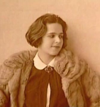 Пешкова, Надежда Алексеевна